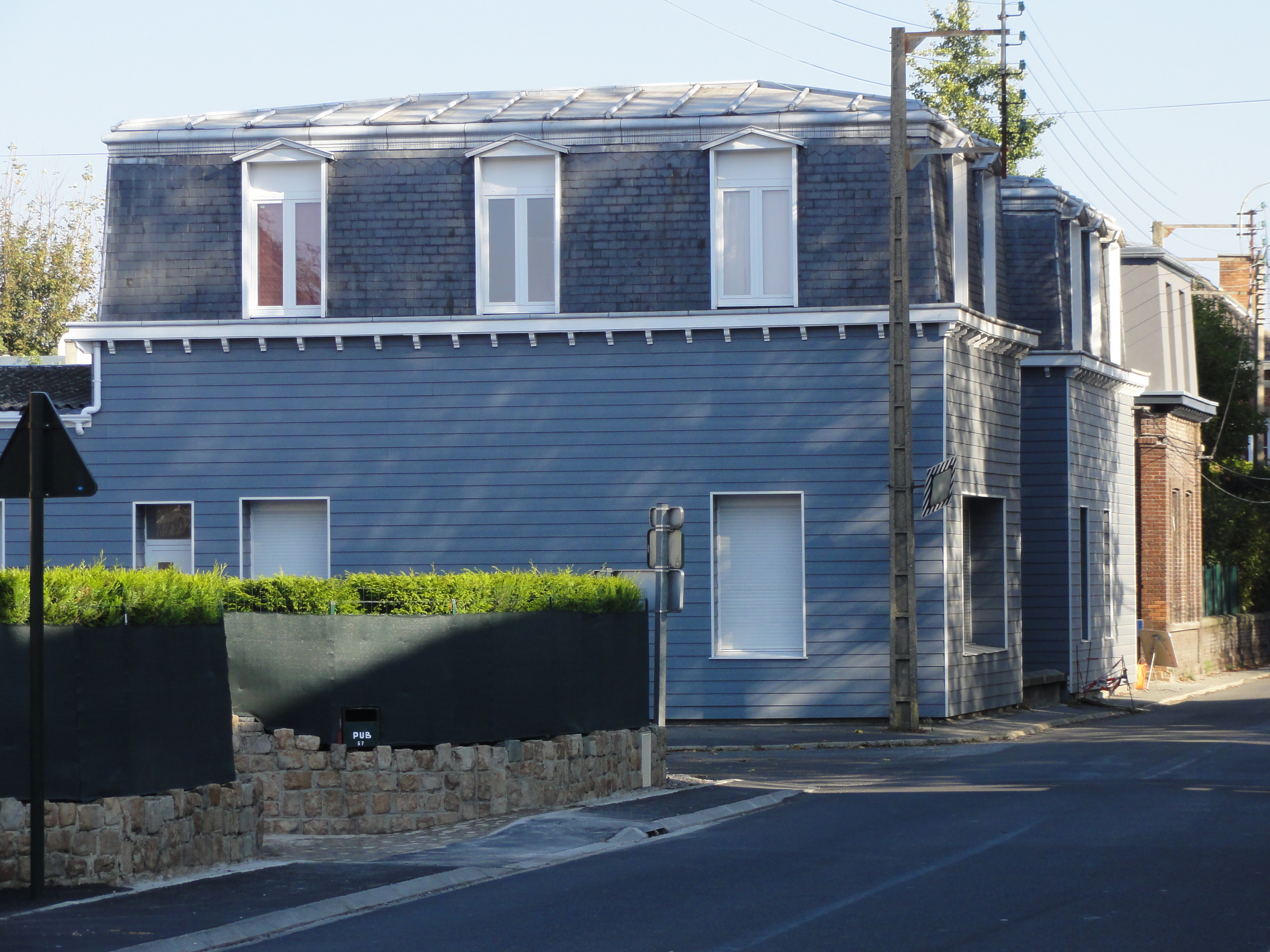 Grands bureaux de la Compagnie des mines de Meurchin dans le bassin minier du Nord-Pas-de-Calais, Meurchin, Pas-de-Calais, Nord-Pas-de-Calais, France.